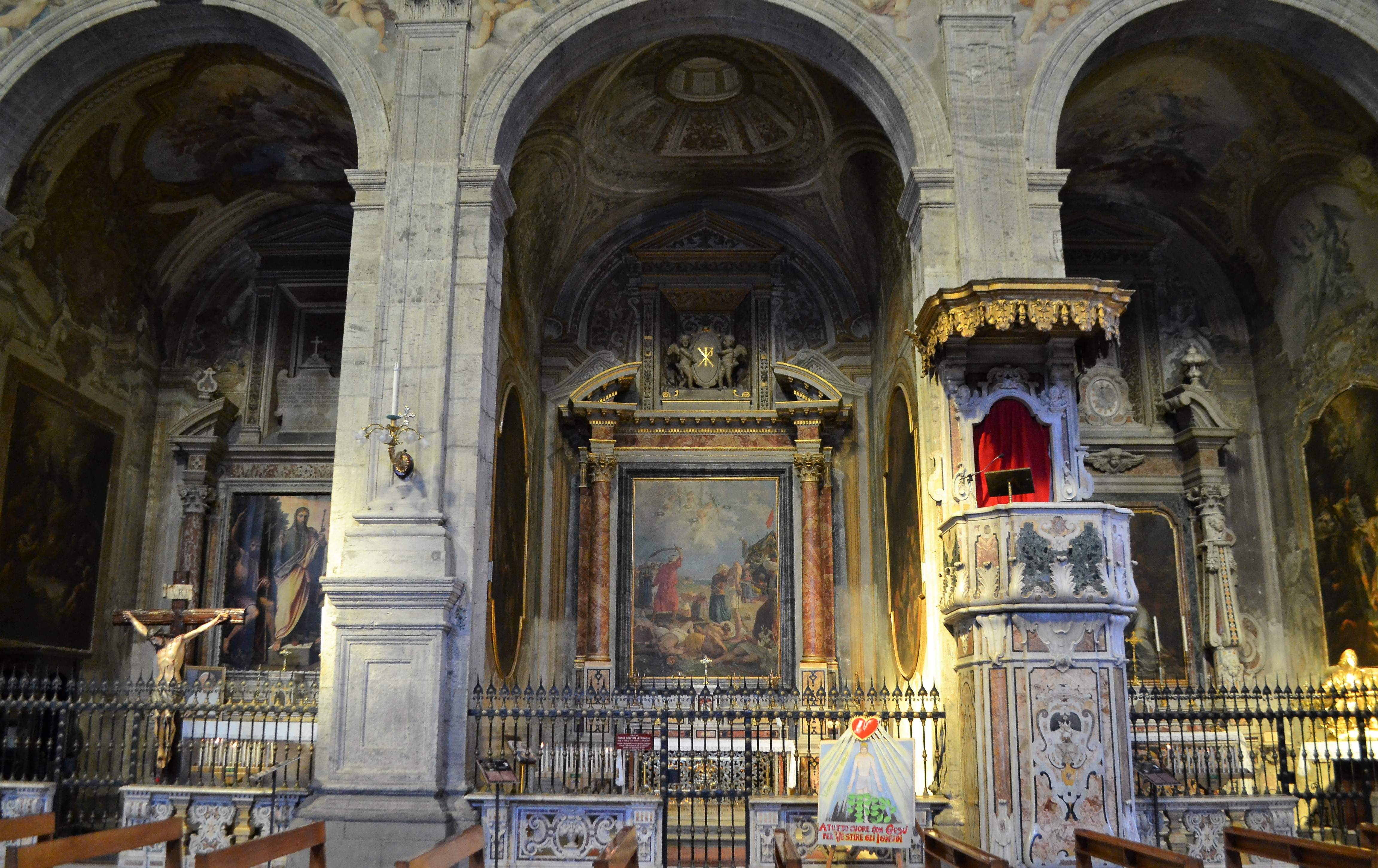 Chiesa di Santa Caterina a Formiello di Napoli - scorcio della seconda, quarta e quinta cappella di sinistra.